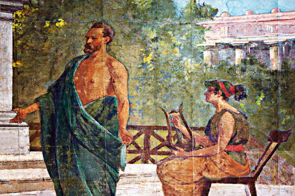 Particolare del quadro di Gustavo Mancinelli: «Eschilo presenta a Gerone le Etnee a Siracusa», dipinto verso la fine dell'800. Fa parte del Sipario del Teatro Politeama di Palermo.